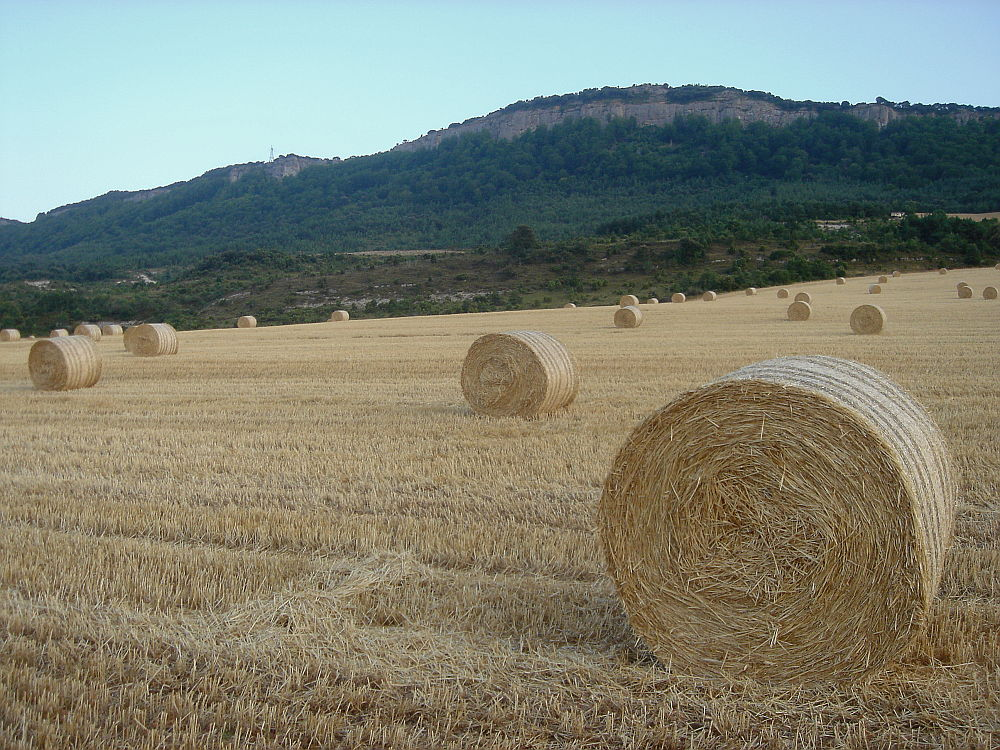 Tuiu mendia